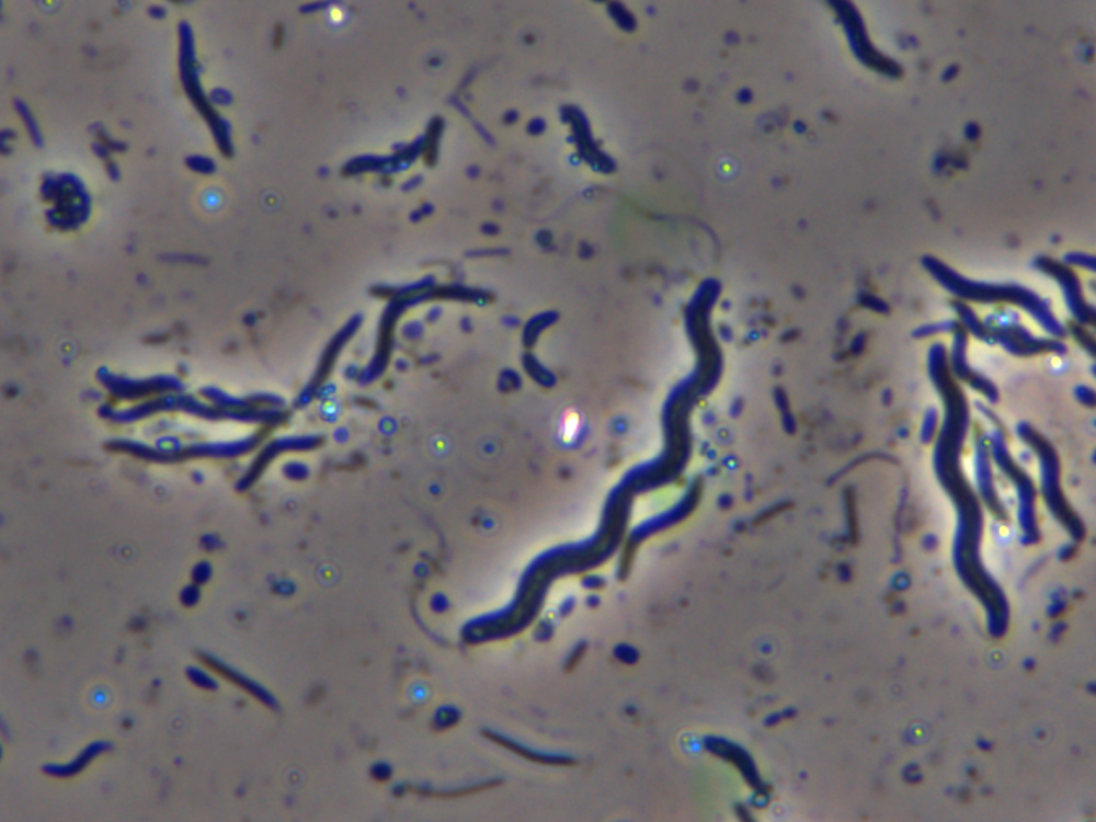 Spirillum